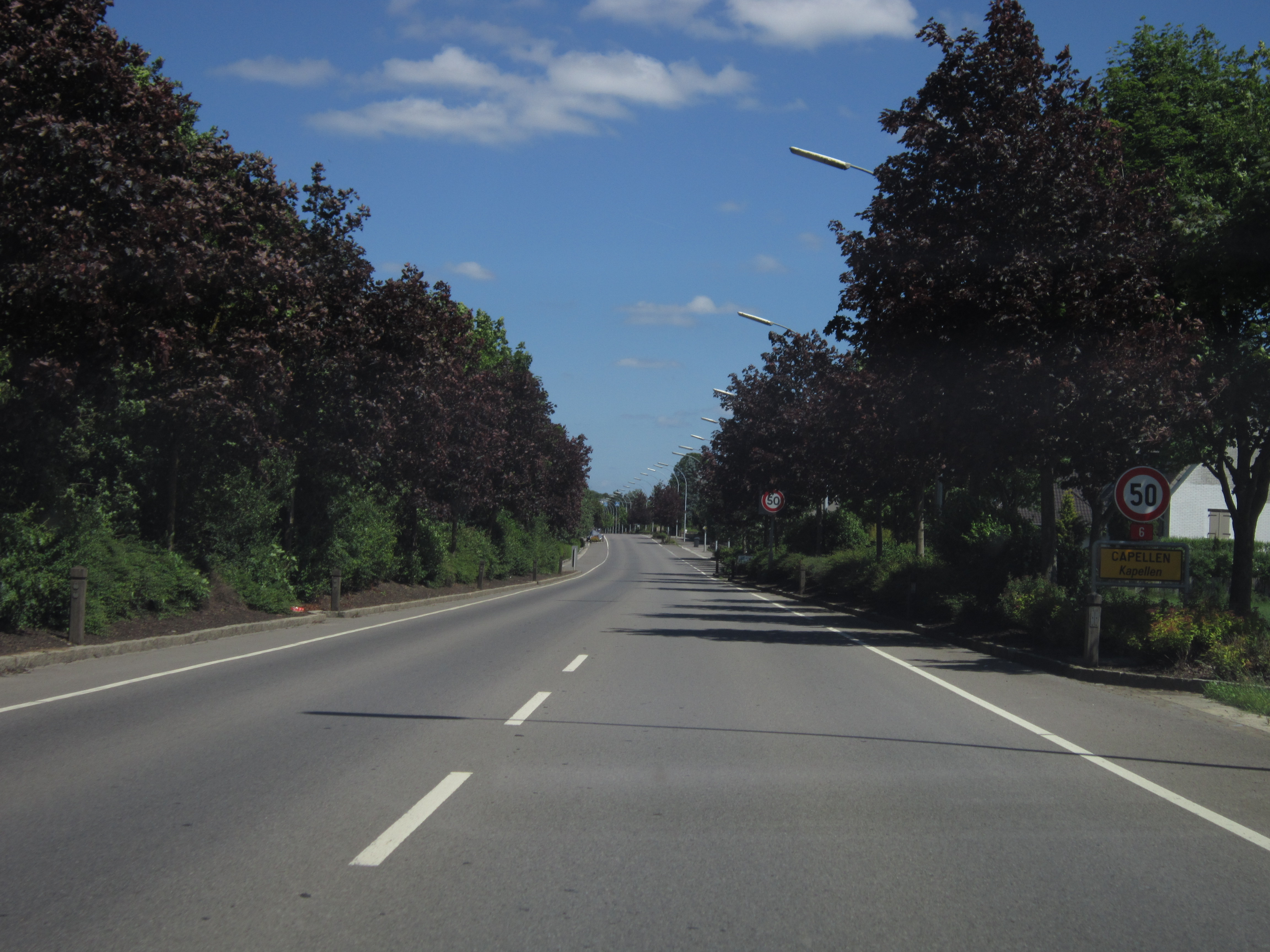 Route nationale 6 luxembourgeoise à l'entrée de Capellen et en direction de la capitale.